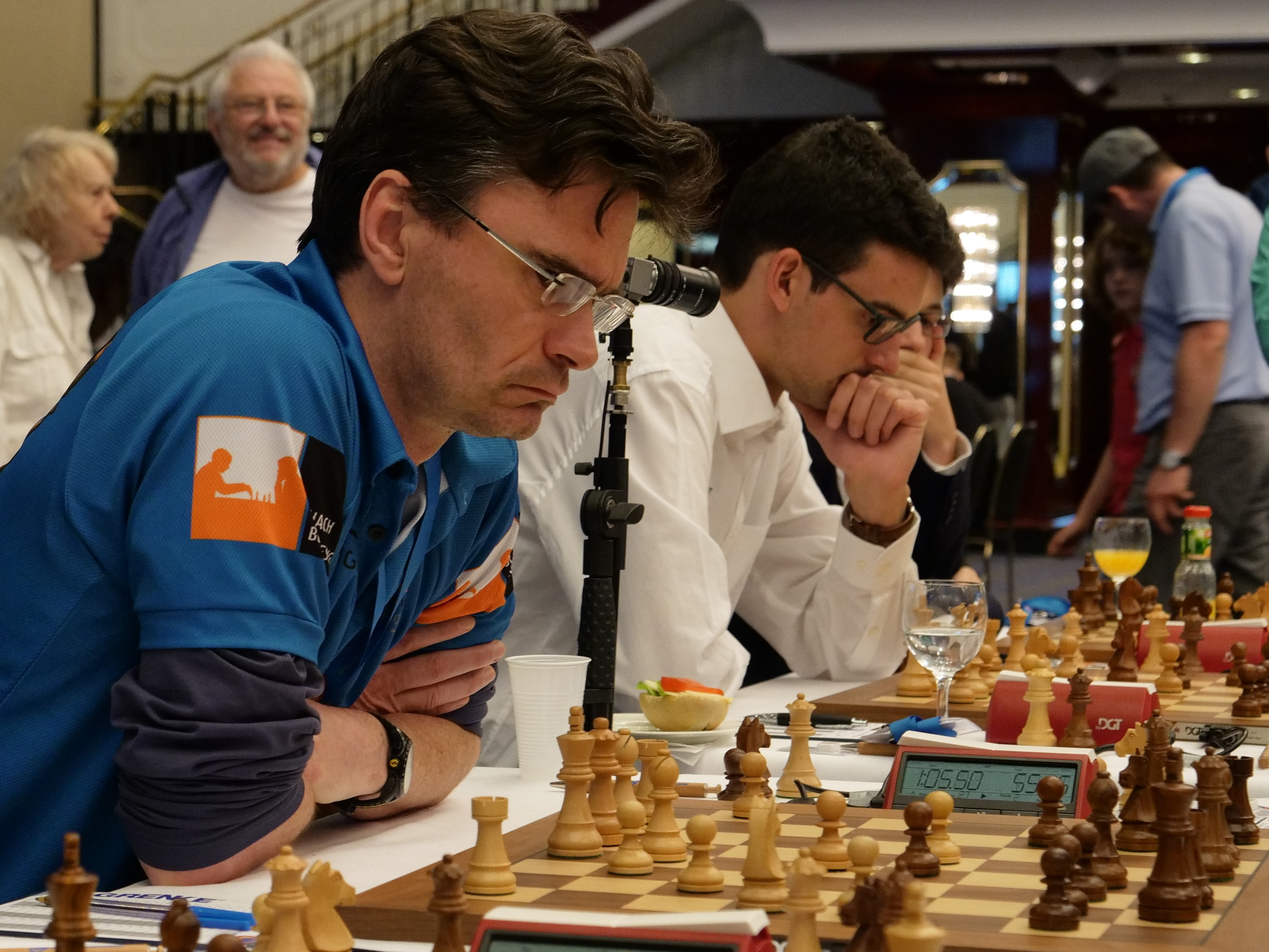 Van Wely und Neef - Bundesliga-Endrunde 30-4-2018